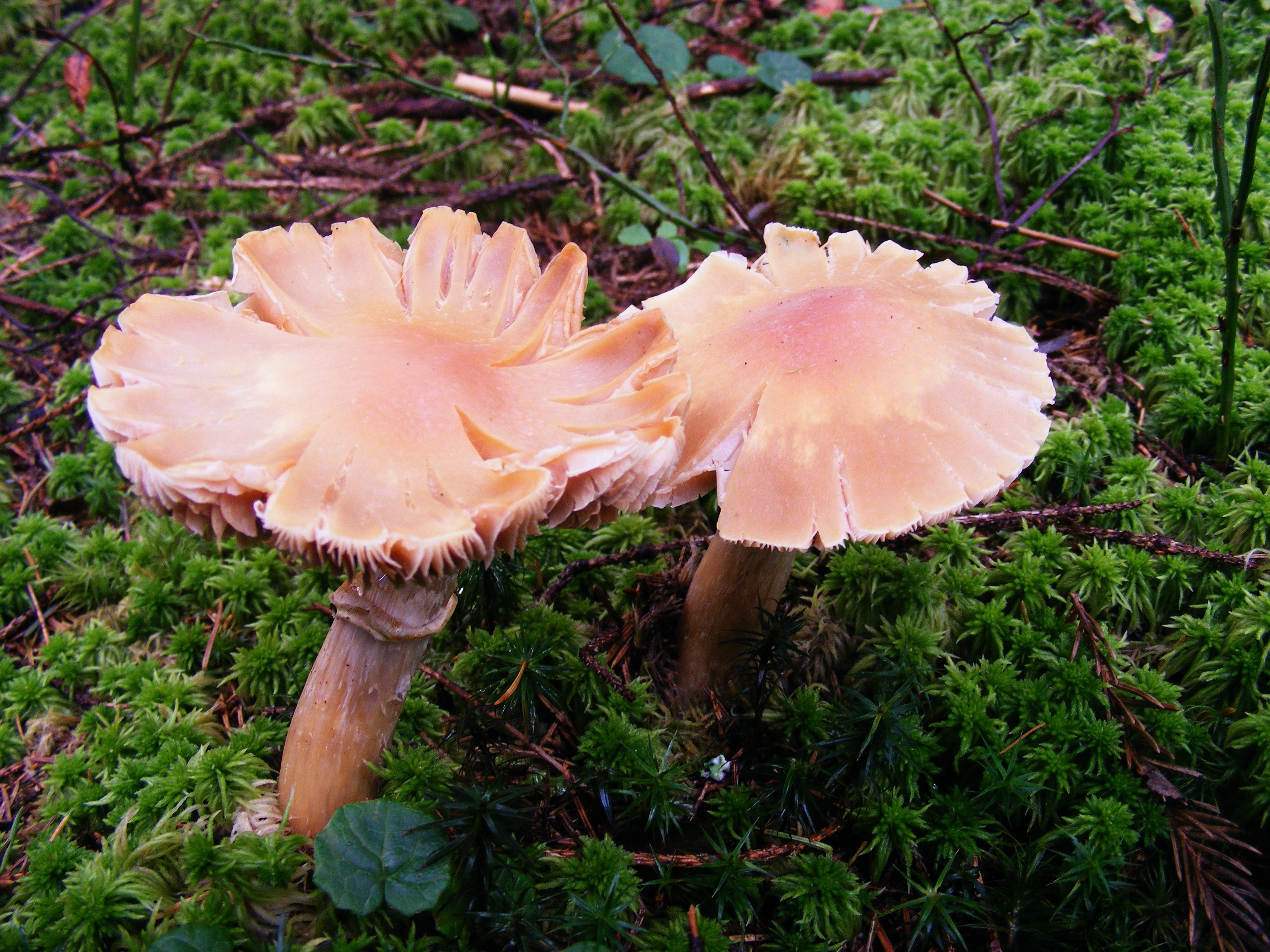 Mycena rosea